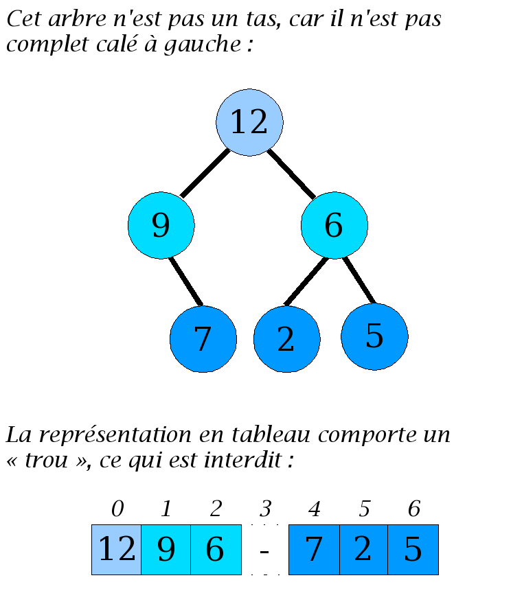 Informatique: contre-exemple n°1 de Tas